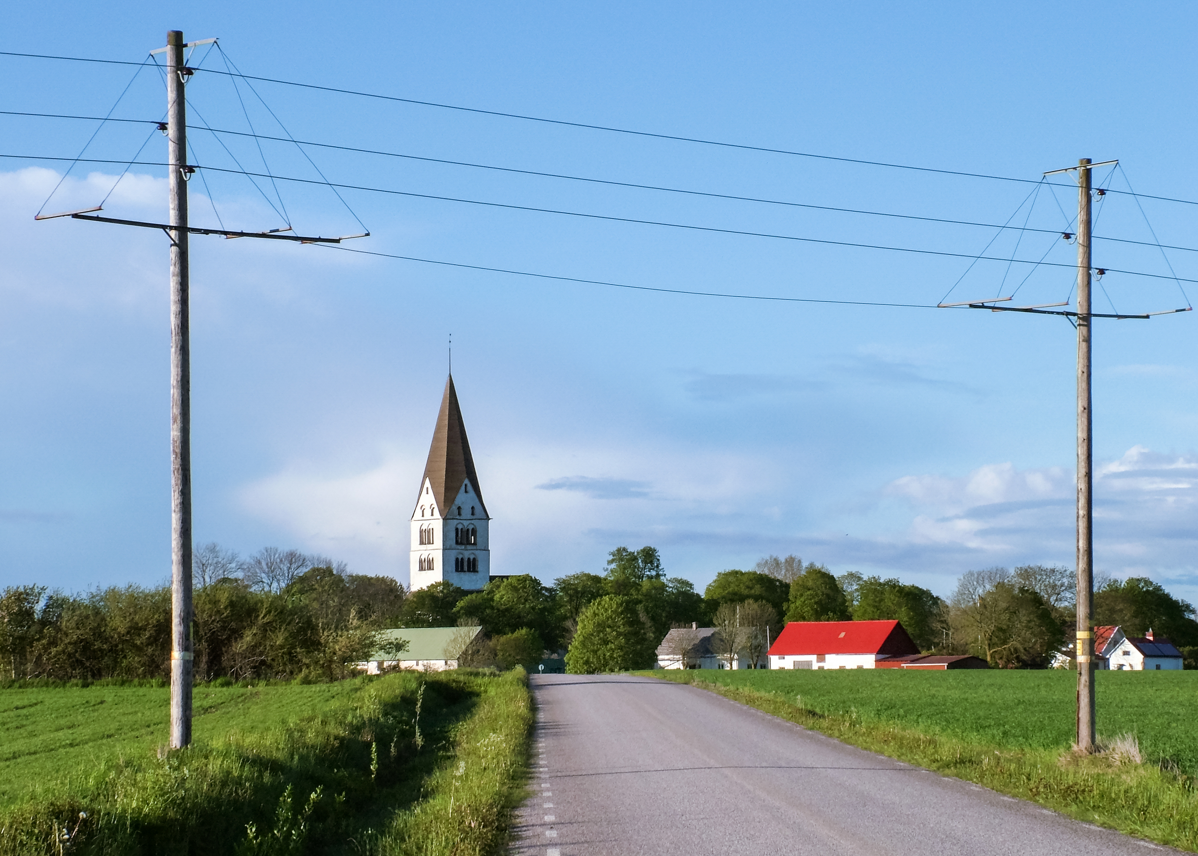 Stenkyrka kyrka sedd från vägen från Martebo till Stenkyrka, Gotland, Sverige